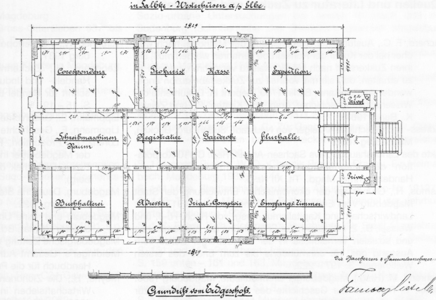 Grundriss des Verwaltungsgebäude von Fahlberg-List, Alt Salbke 60-63, Magdeburg